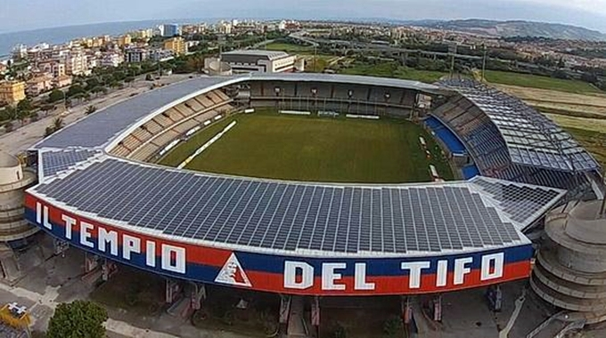 Stadio Riviera delle Palme veduta aerea